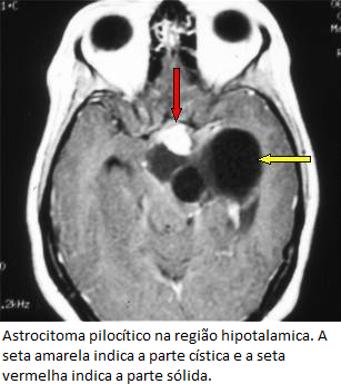 TC de Crânio